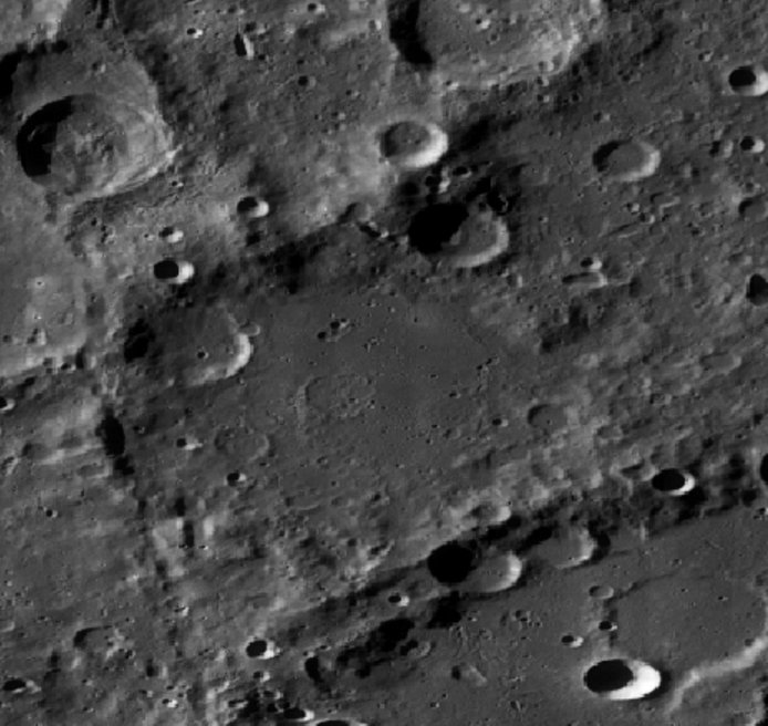 Cráter lunar Hildegard. (Imagen LRO)